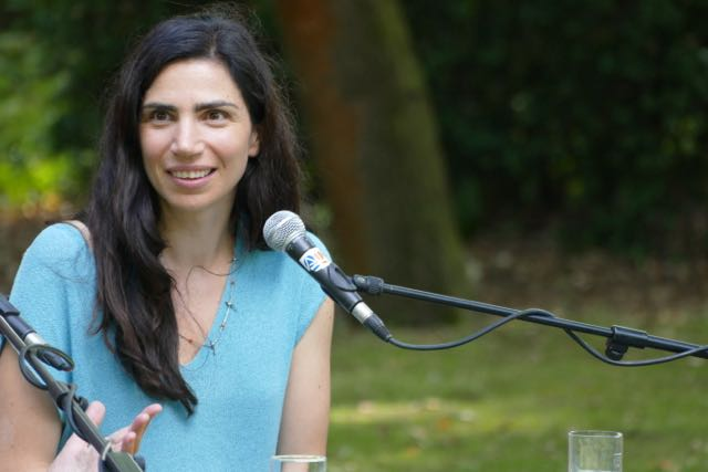 Dana Grigorcea auf dem Erlanger Poetenfest 2015. Sie spricht mit Verena Aufregen über ihren Roman "Das primäre Gefühl der Schuldlosigkeit"